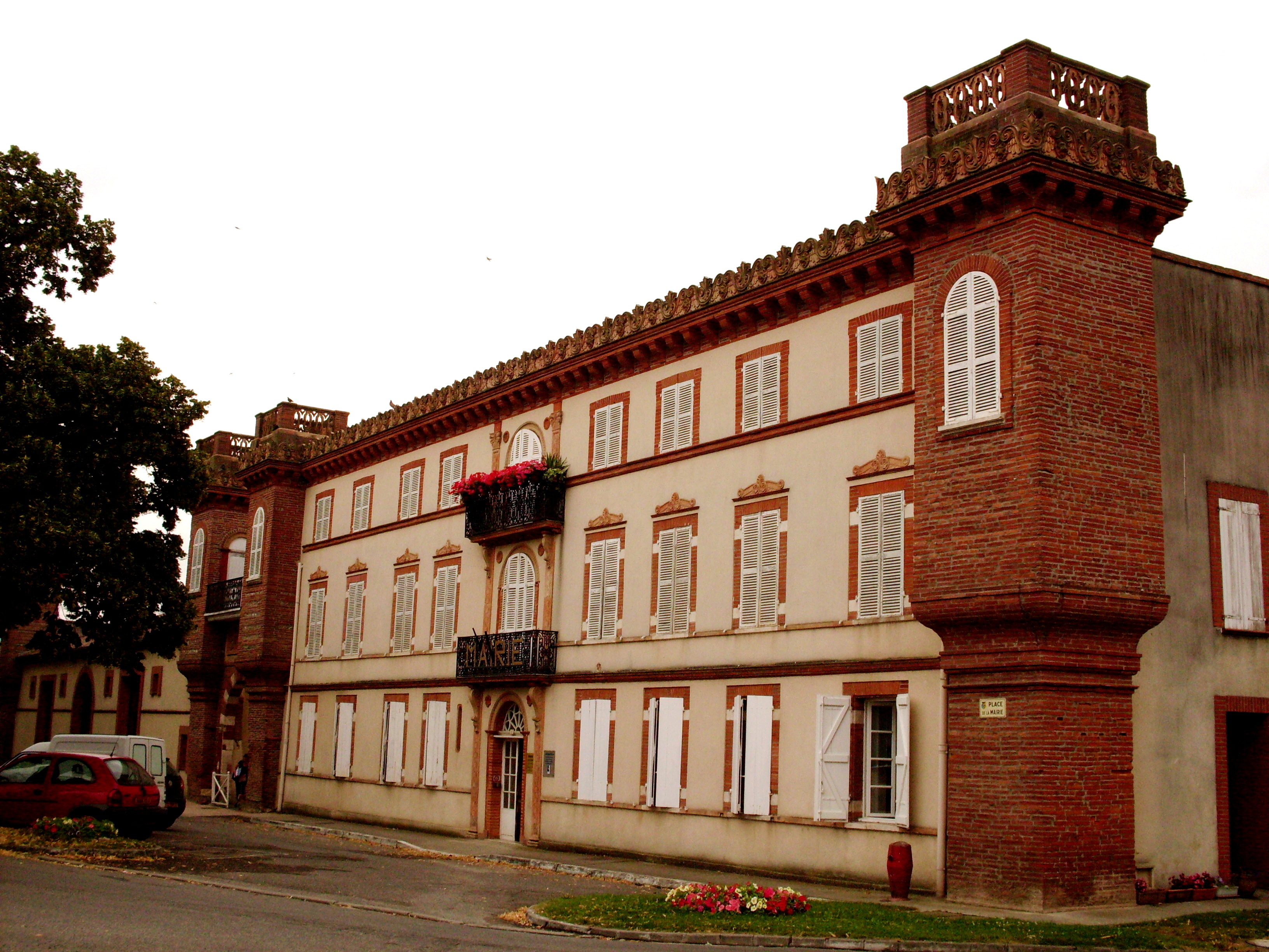 Mairie de Lavernose-Lacasse (Haute-Garonne, France), autrefois un château, construit en 1594.